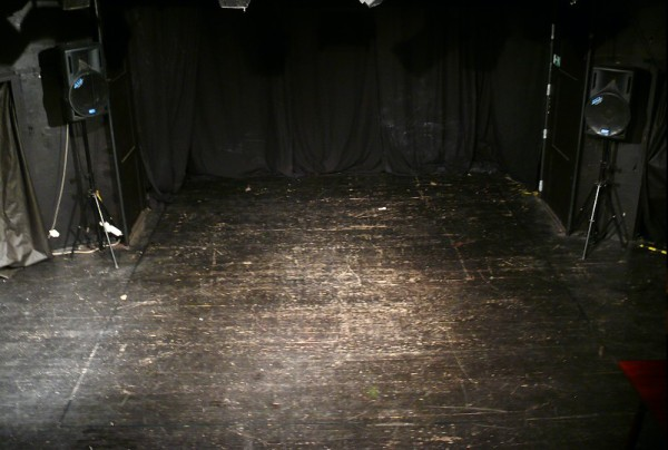 jeviště Staré Arény Ostrava